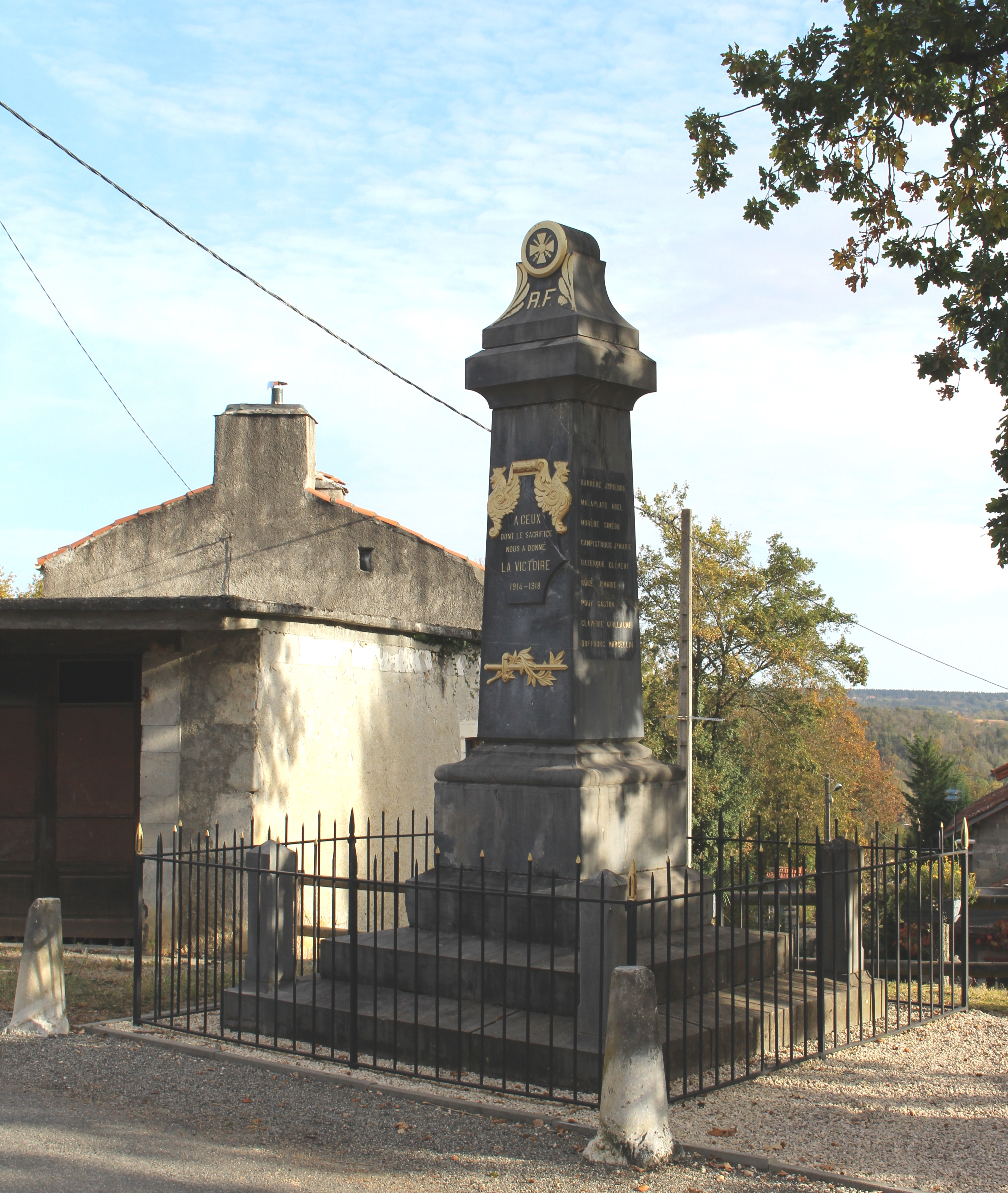 Monument aux morts de Montoussé (Hautes-Pyrénées)